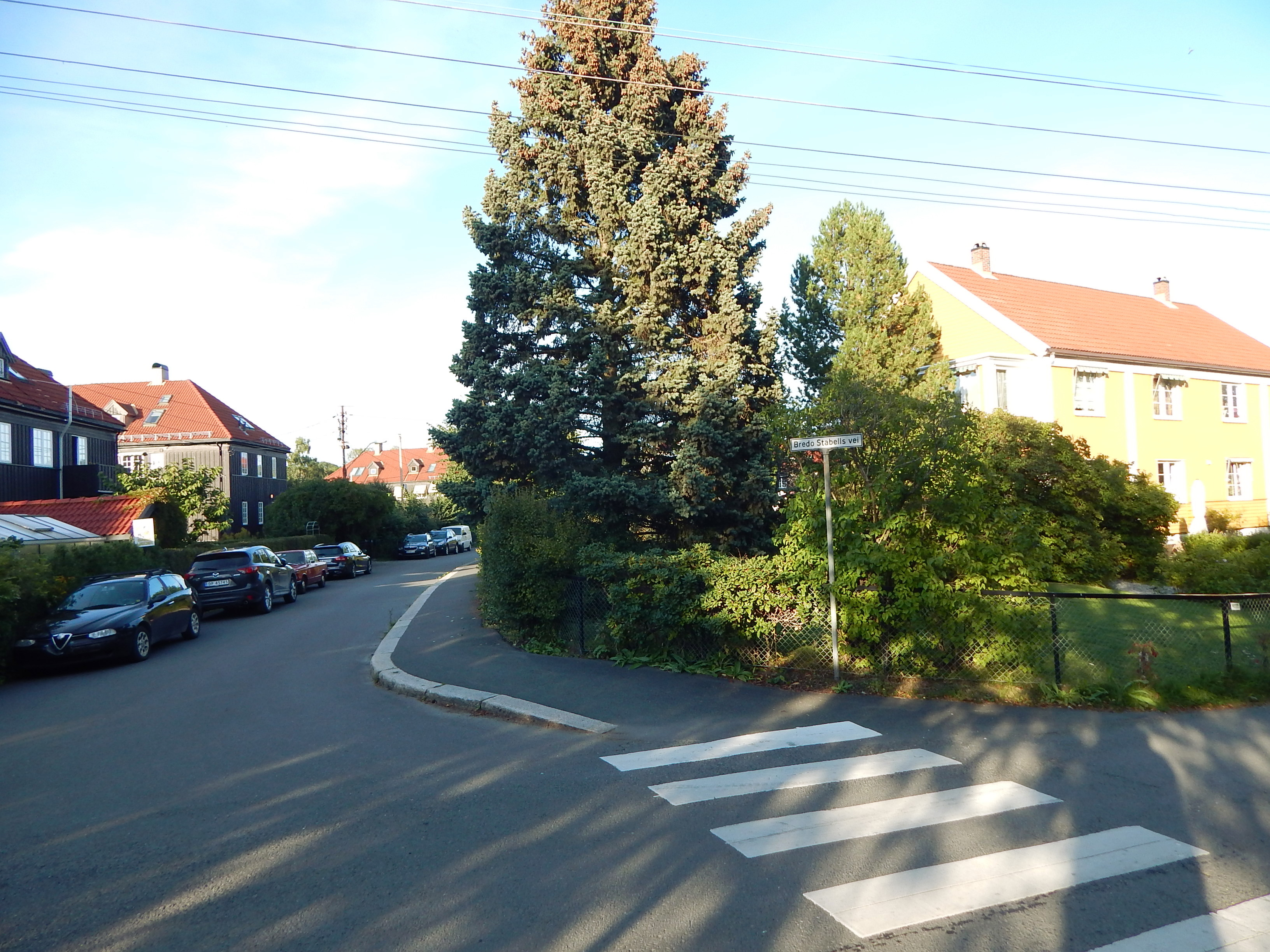 Bredo Stabells vei sett fra Jutulveien